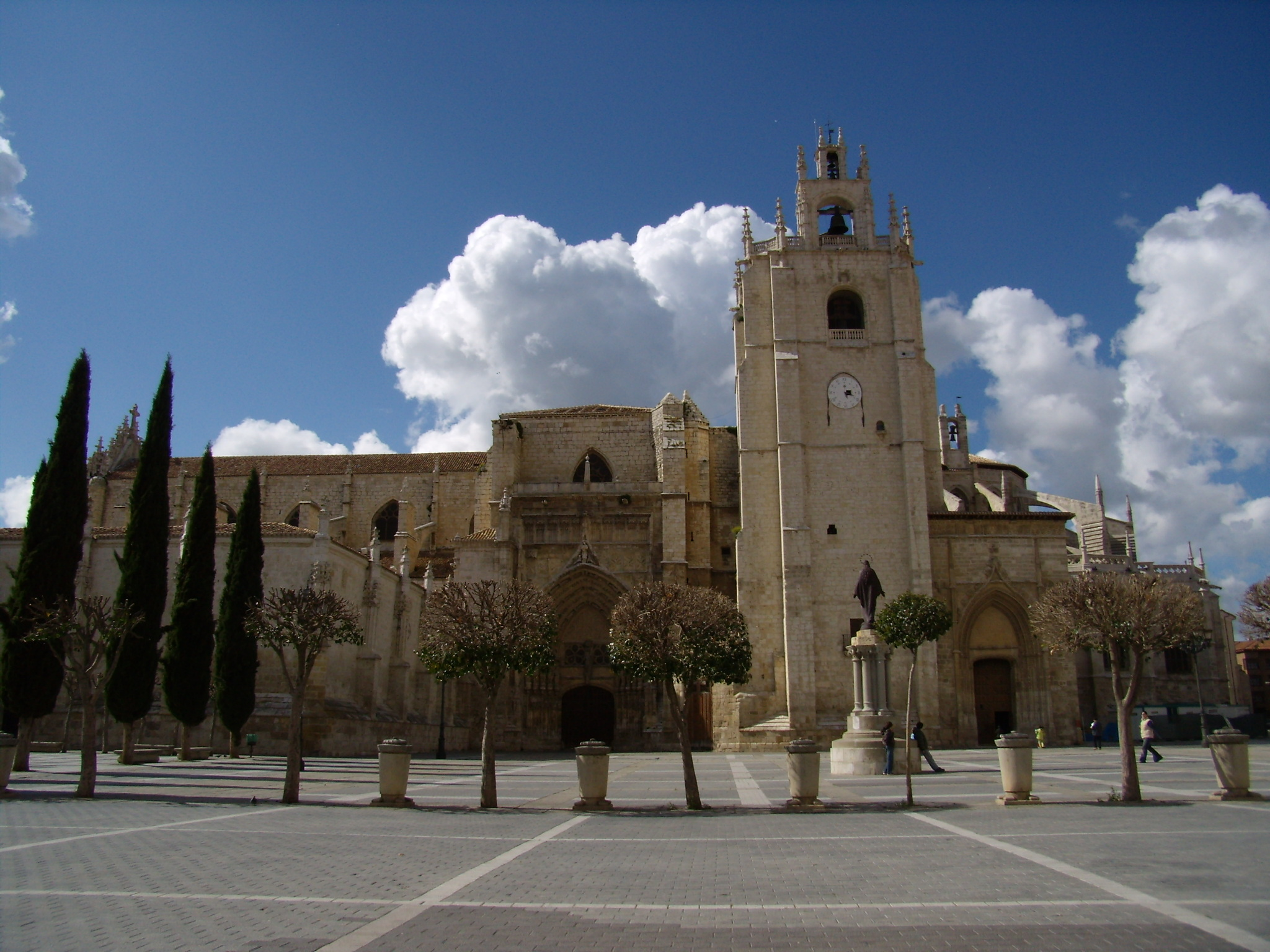 Catedral de San Antolín en Palencia.